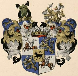 Tiesenhauseni suguvõsa vabahärravapp